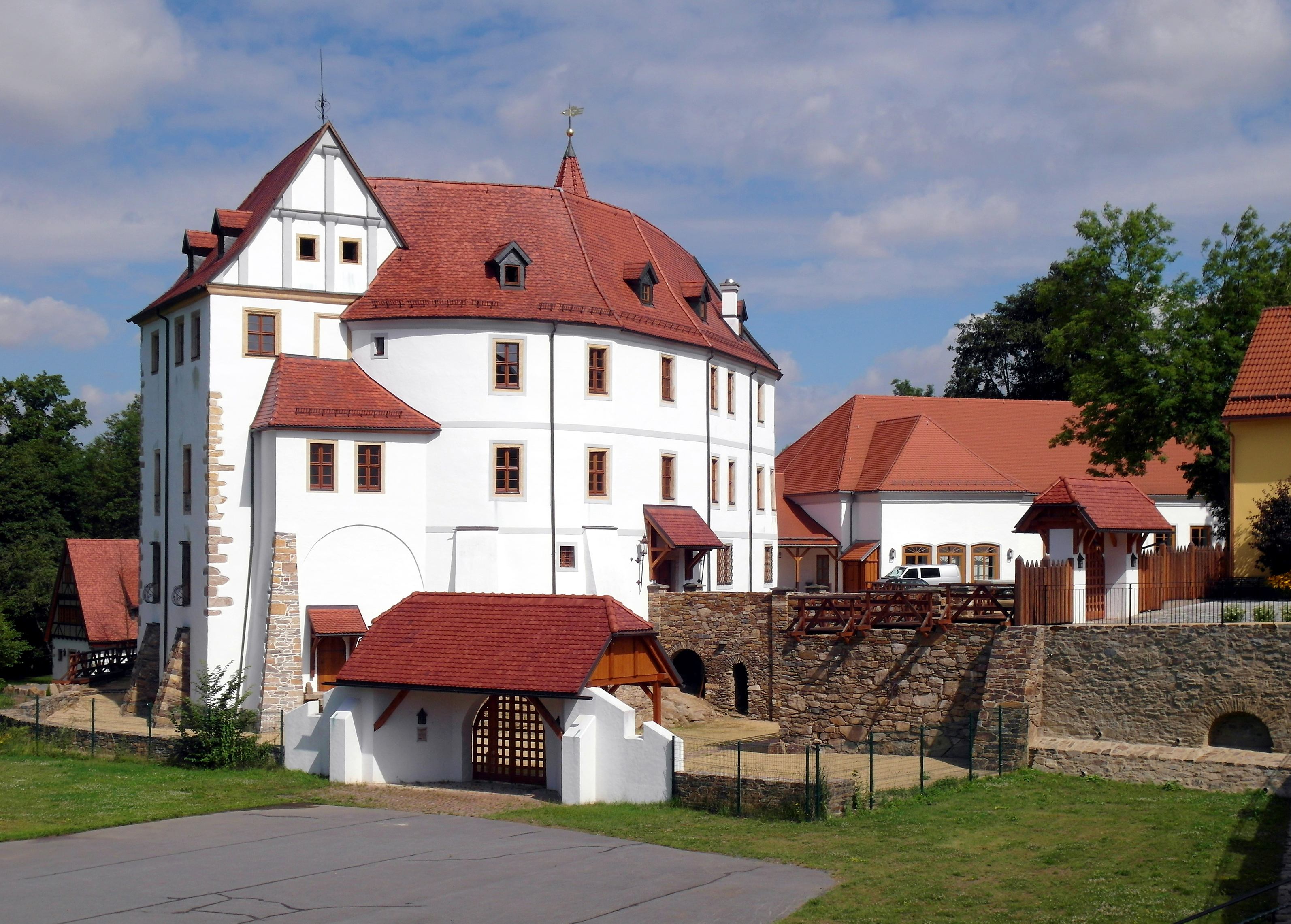 18.07.2016 09600 Weißenborn, Frauensteiner Str. 8: Schloß, Frauensteiner Straße 8 (GMP: 50.872061,13.399188). Sicht von SO. Burg vermutlich aus slawischen Zeit. 1213 erstmals erwähnt. Ab 1365 für 13 Generationen im Besitz der Familie Hartitzsch. Danach viele Besitzerwechsel. Anlage im Wesentlichen spätgotisch, 16. - 17. Jh. mit späteren Umbauten. In der DDR war das Schloß Kulturhaus des VEB Papierfabrik Weißenborn. Arzt-, Bibliotheks- und Wohnräume wurden geschaffen und 1954 der Kulturhaussaal angebaut. Seit 2002 Privatbesitz der Familie Graff Pehrson Vesterager. Umfassend saniert. Nicht mehr öffentlich zugänglich. [SAM6943.JPG]20160718110DR.JPG(c)Blobelt